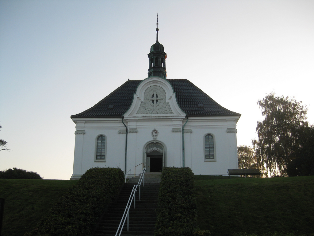 Hellebæk Kirke